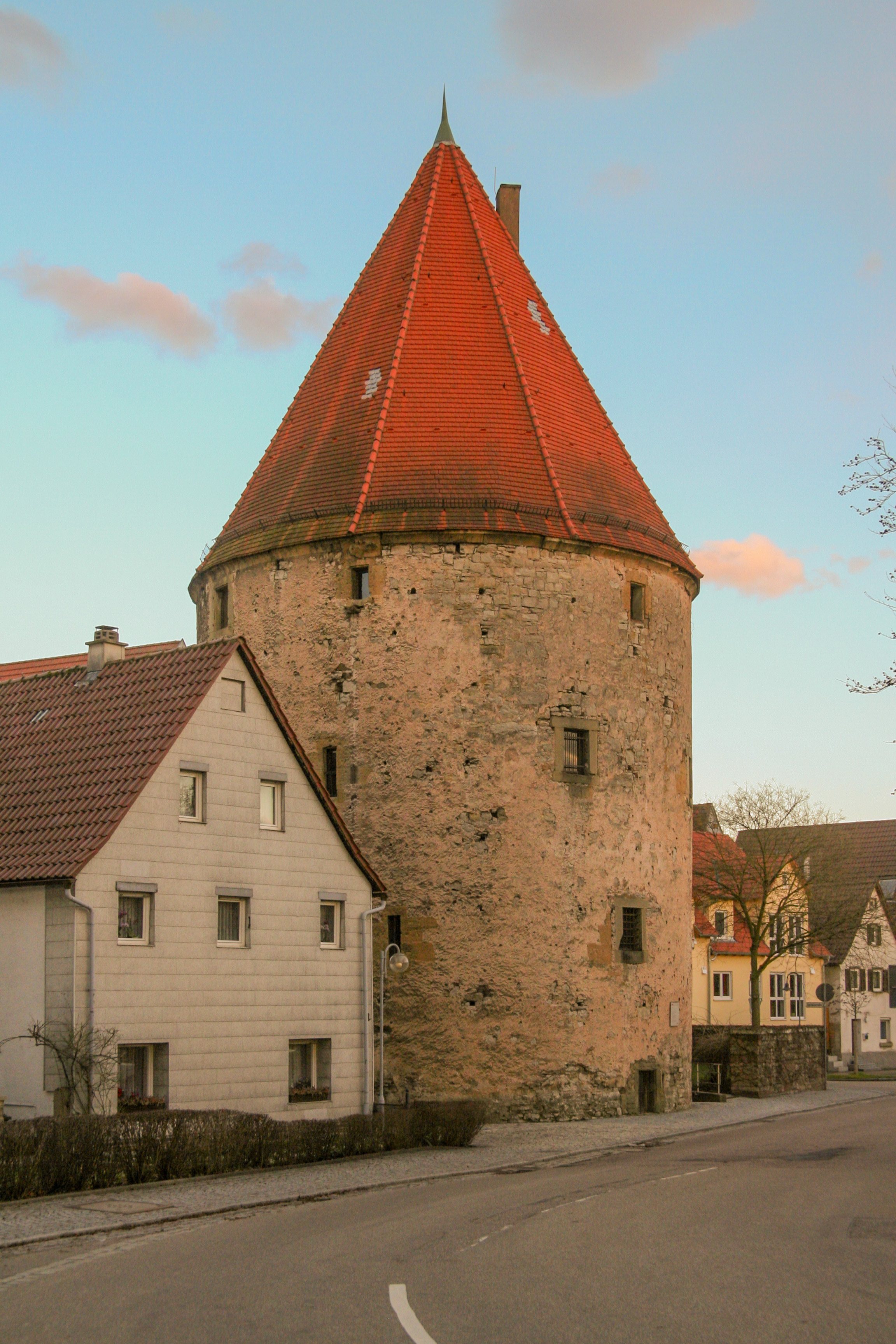 Pulverturm in Vaihingen an der Enz. Der mit bis zu 3 m dicken Mauern erbaute Turm war Eckturm der Stadtbefestigung. In ihm wurden die städtischen Vorräte an Schießpulver gelagert. Der Pulverturm wurde auf Kosten der Familien Gremp und Aschmann 1492 erbaut. Von 1819 bis 1844 wurde er als Kriminalgefängnis genutzt.